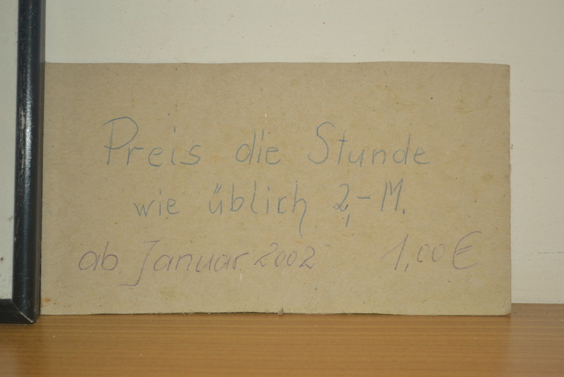 Nutzungsgebühr für die Kaltmangel in Zaschendorf (Dresden)